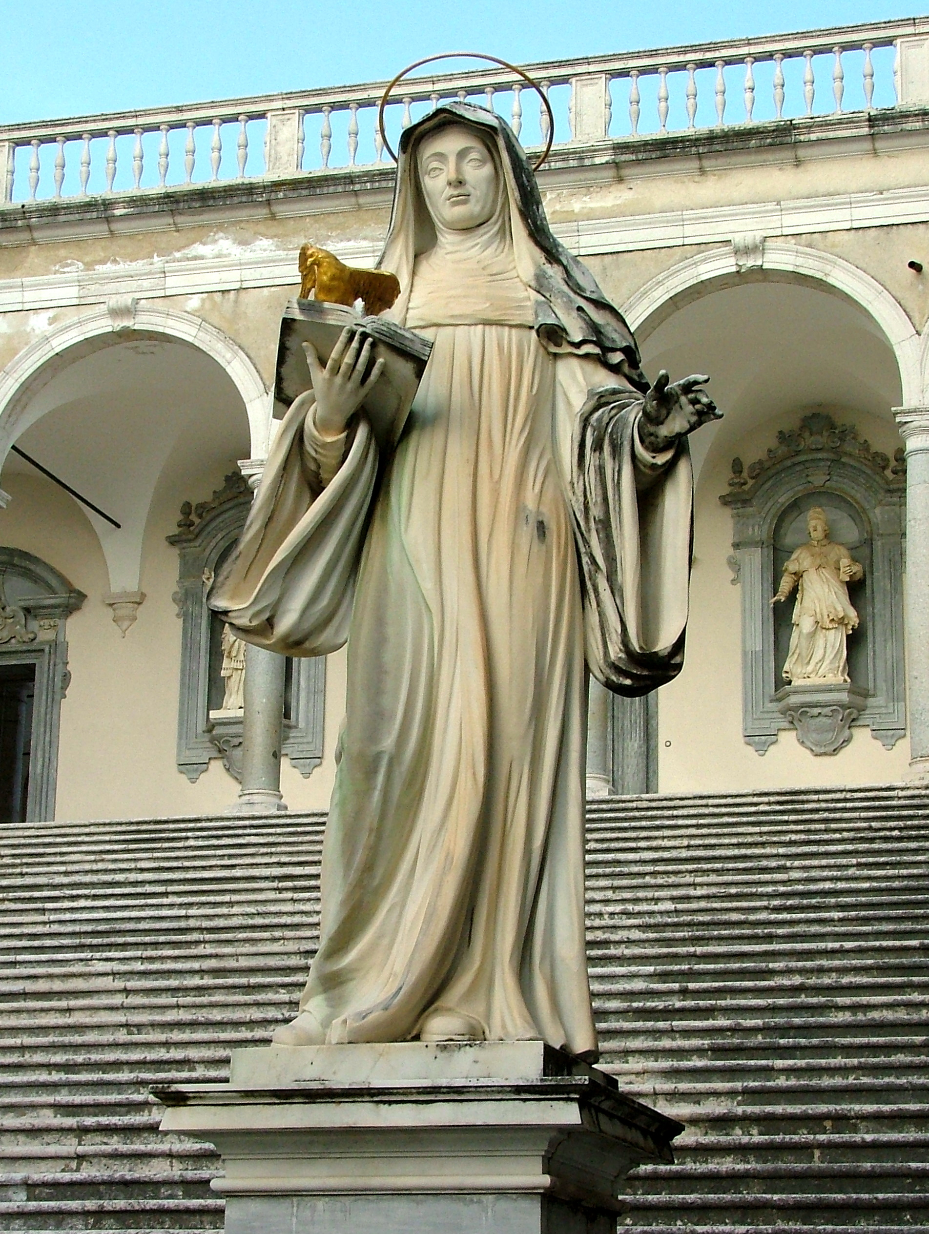 Statua di Santa Scolastica nel monastero di Montecassino